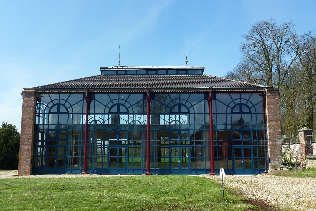 Château de Châtenay. L'Orangerie, qui accueille aujourd'hui des séminaires et conventions d'entreprise.